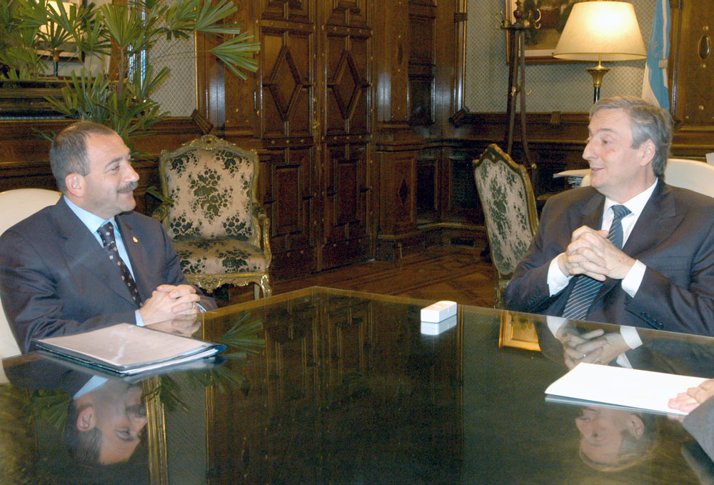 Casa Rosada, Despacho Presidencial - El presidente Néstor Kirchner recibió al intendente de Córdoba, Luis Juez.